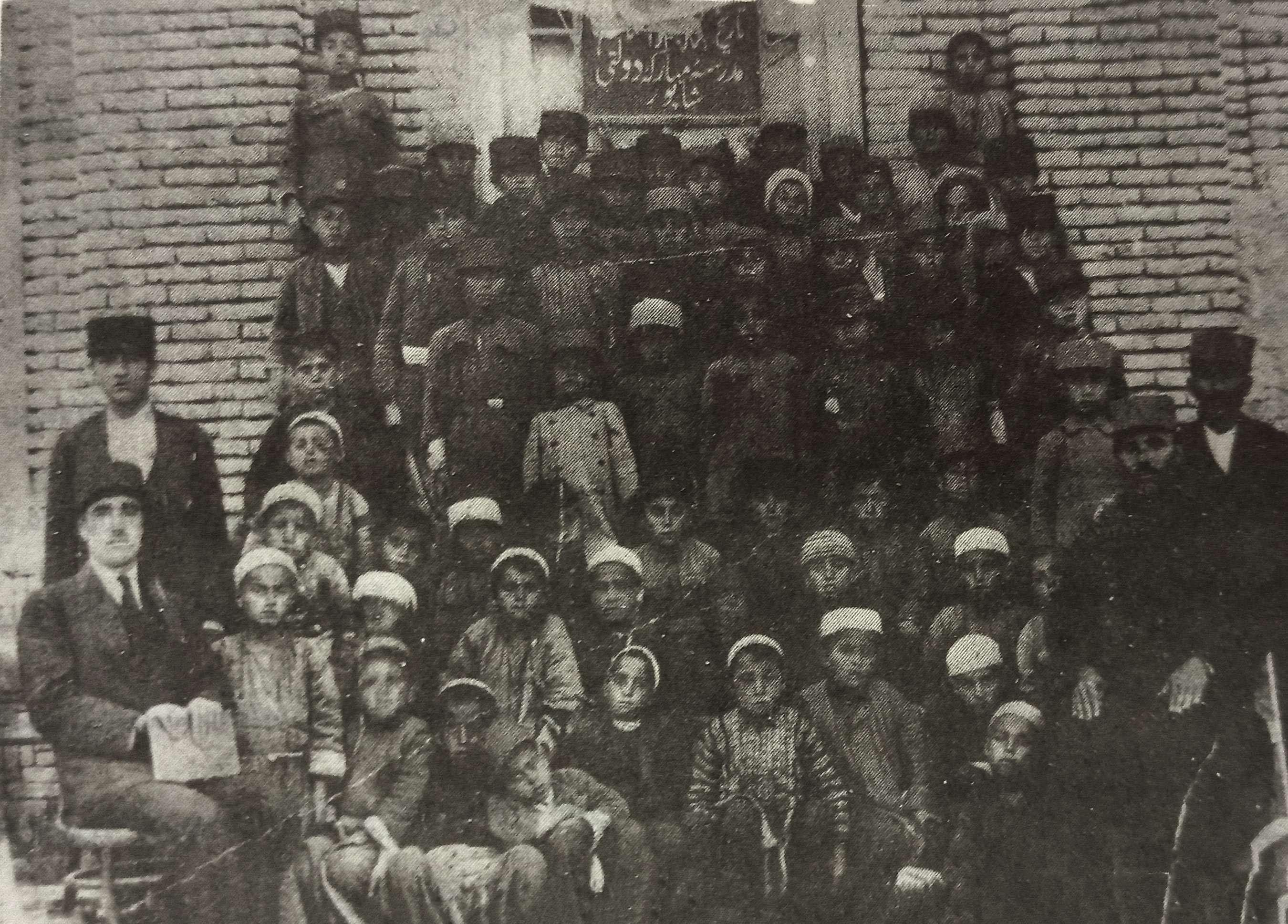 اولین مدرسه دولتی شهر بوکان بنامه شاپور در سال 1307